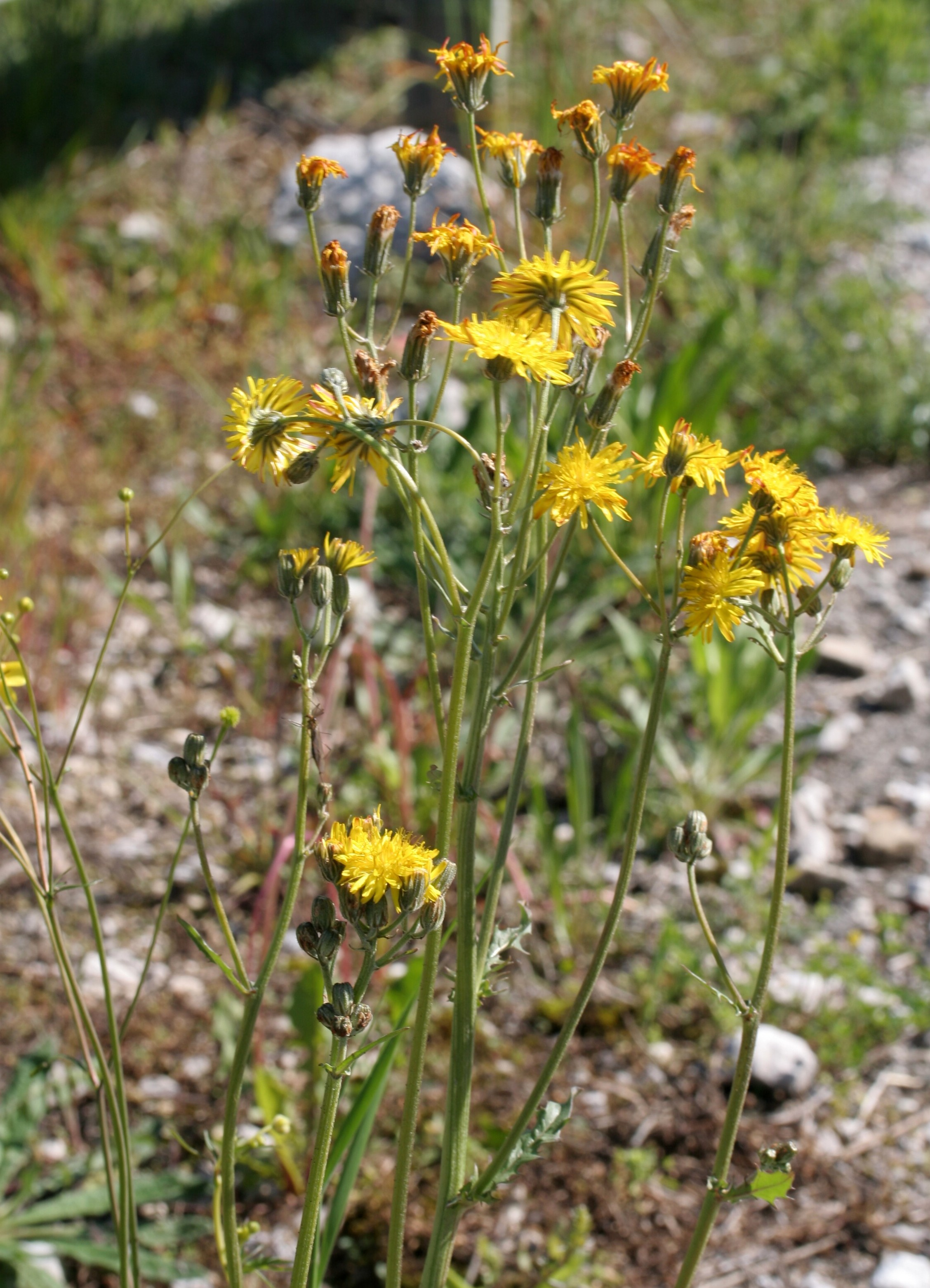 Crepis_biennis (Radichiella dei prati) Località: Visome (BL), 350 m s.l.m.